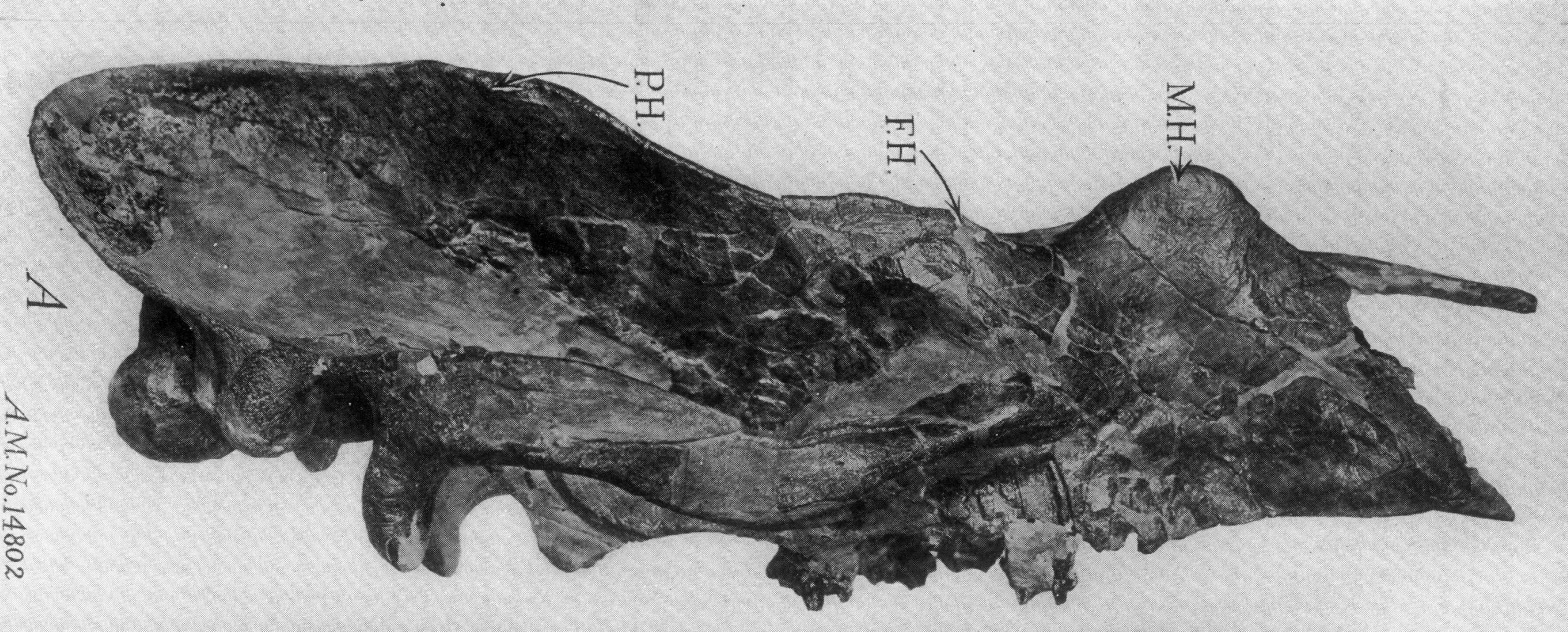 Bathyopsis fissidens skull.